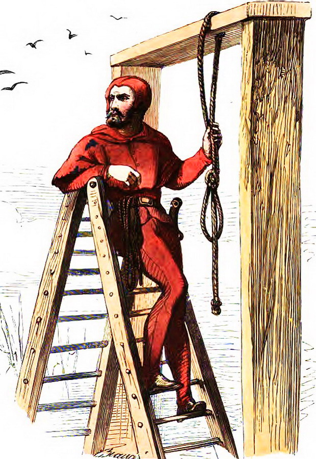 L'ancien bourreau (potence)